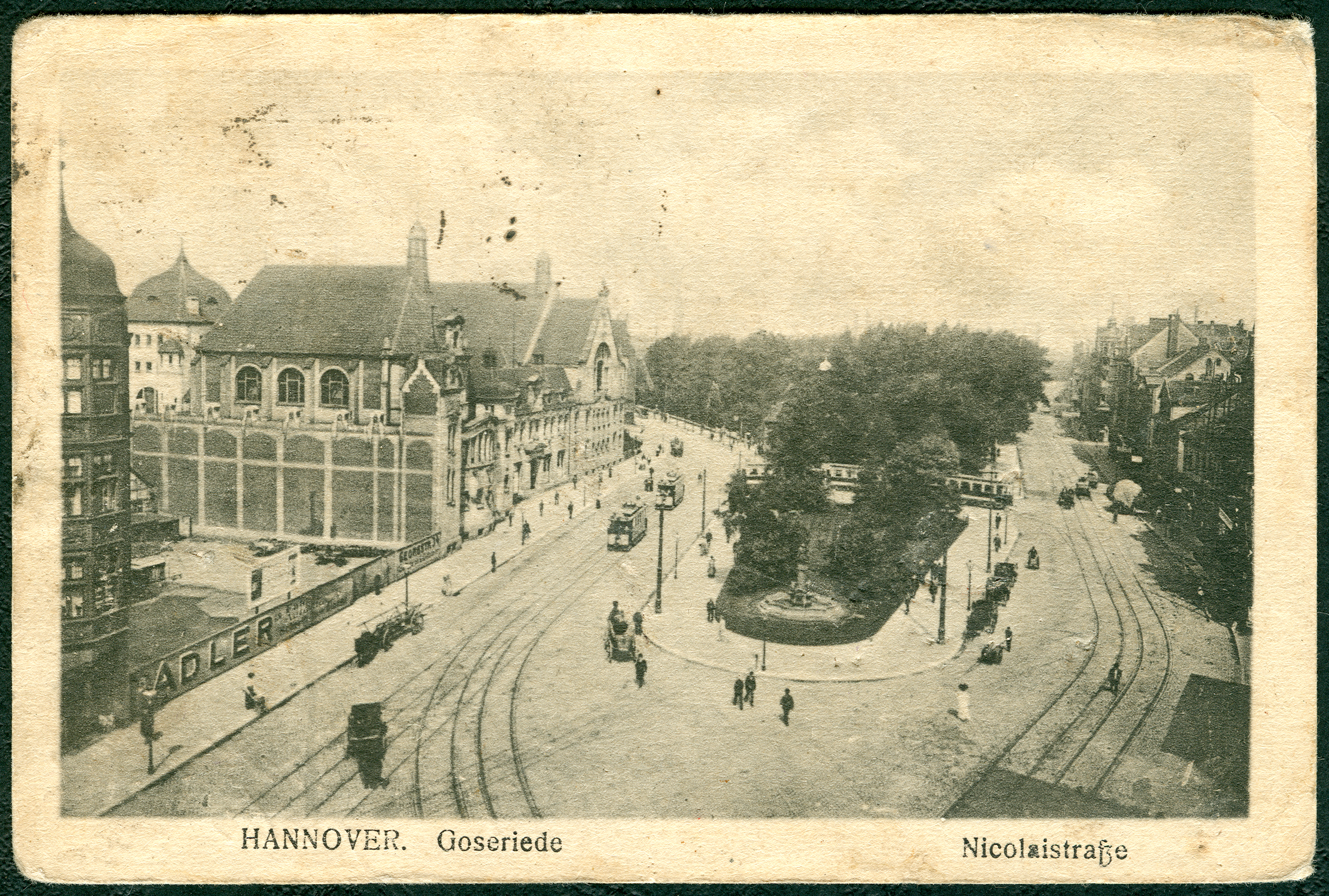 Bildseite der Ansichtskarte eines anonymen Fotografen, tituliert "Hannover. Goseriede Nikolaistraße". Neben dem Gebäude ganz links ist hinter einer Mauer mit der Reklame-Aufschrift "Adler" und der Adressangabe "Georgstraße 34" ein freier Bauplatz (mit einem Fachwerkbau im Hintergrund), dahinter das schon errichtete Goseriedebad. Davor fahren Straßenbahnen durch die Goseriede. In der Bildmitte ist der Gänselliesel-Brunnen zu erkennen, hinter dem weitere Straßenbahnen wenden können (vor der Nikolai-Kapelle). Auch durch die Nicolaistraße" (Nikolaistraße) führen noch Straßenbahngleise. In zweien der Gebäude ganz rechts soll laut Rainer Hoffschildt Leo Grahe gewohnt haben, in der Nicolaistraße 8A und 18A; er starb 1943 im KZ Neuengamme ...